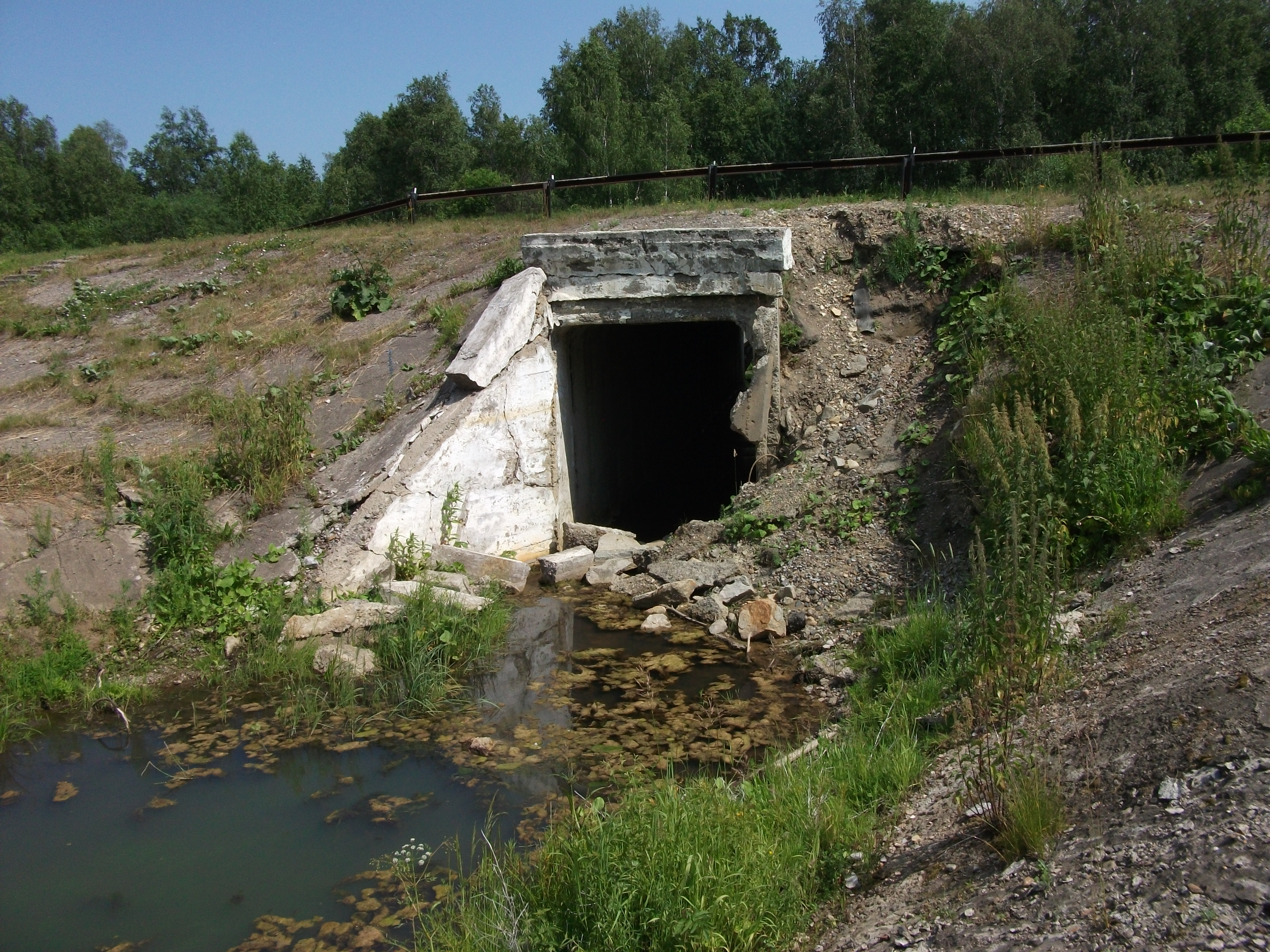 Труба явно нуждается в ремонте